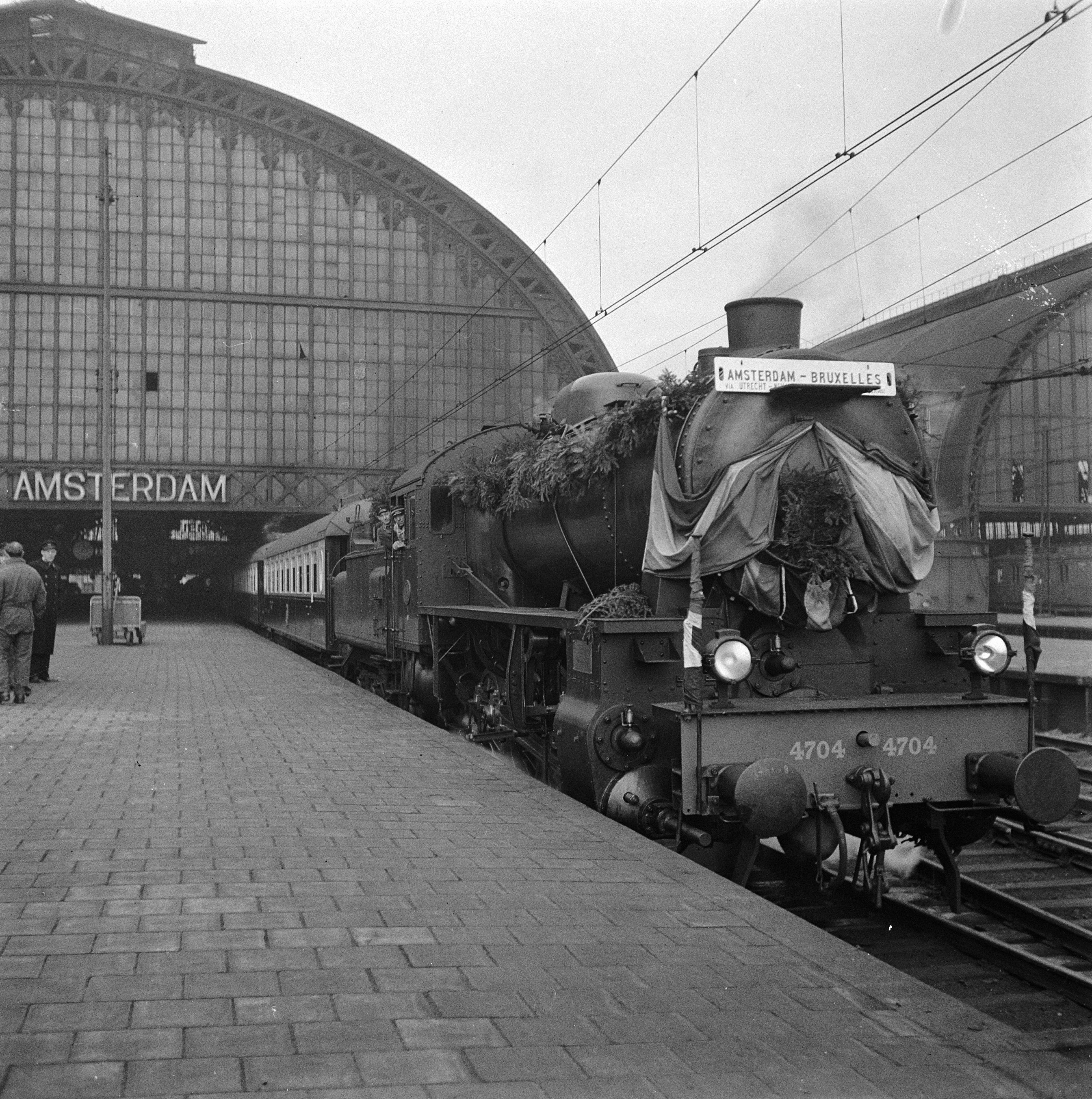 Collectie / Archief : Fotocollectie Anefo Reportage / Serie : [ onbekend ] Beschrijving : Eerste Pullman trein naar Brussel Datum : 5 december 1945 Locatie : Amsterdam, Brussel Trefwoorden : spoorwegen, treinen Persoonsnaam : Pullman Fotograaf : Haren Noman, Theo van / Anefo Auteursrechthebbende : Nationaal Archief Materiaalsoort : Negatief (zwart/wit) Nummer archiefinventaris : bekijk toegang 2.24.01.03 Bestanddeelnummer : 901-2112